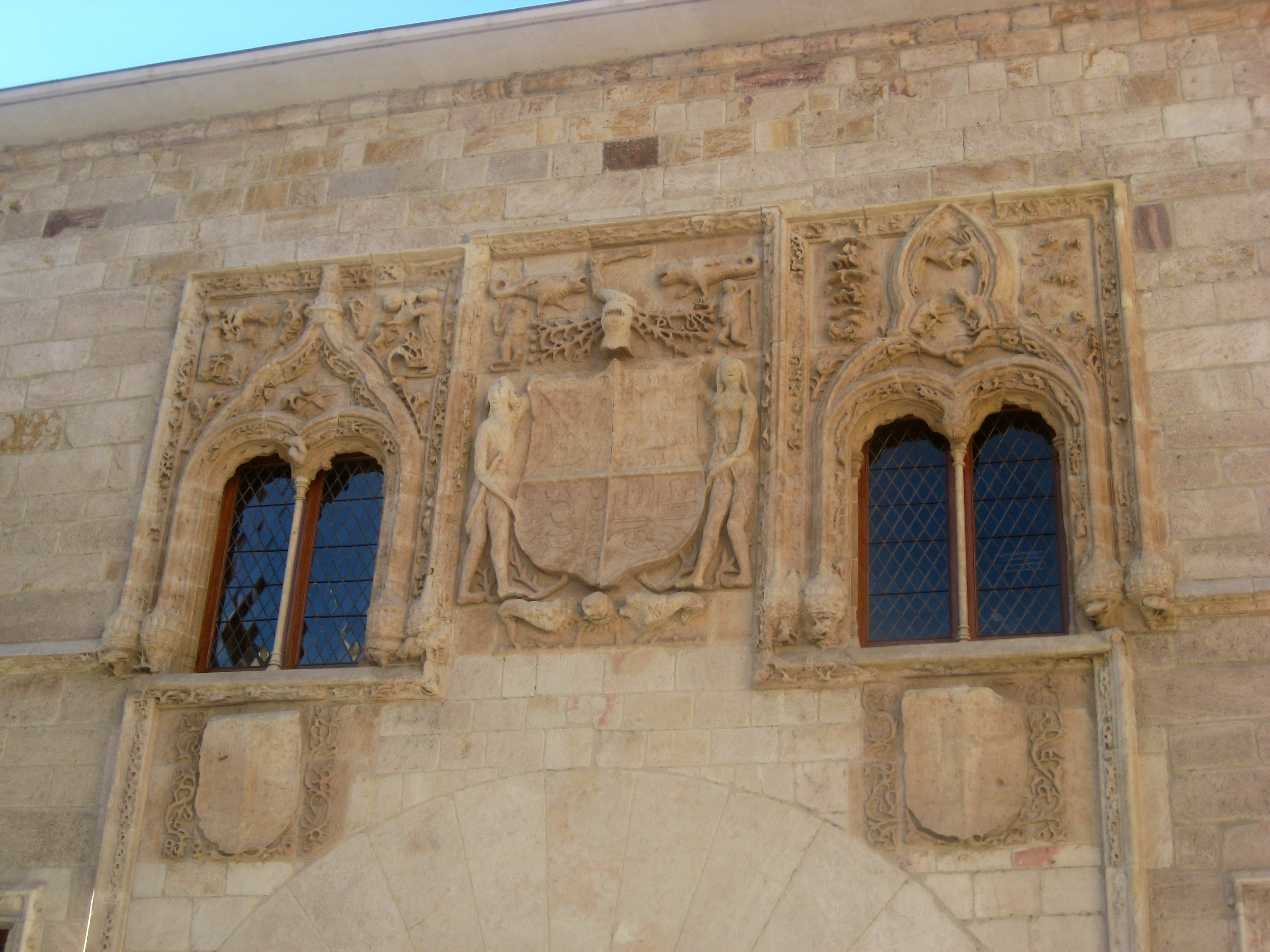 Palacio de los Momos (Zamora)